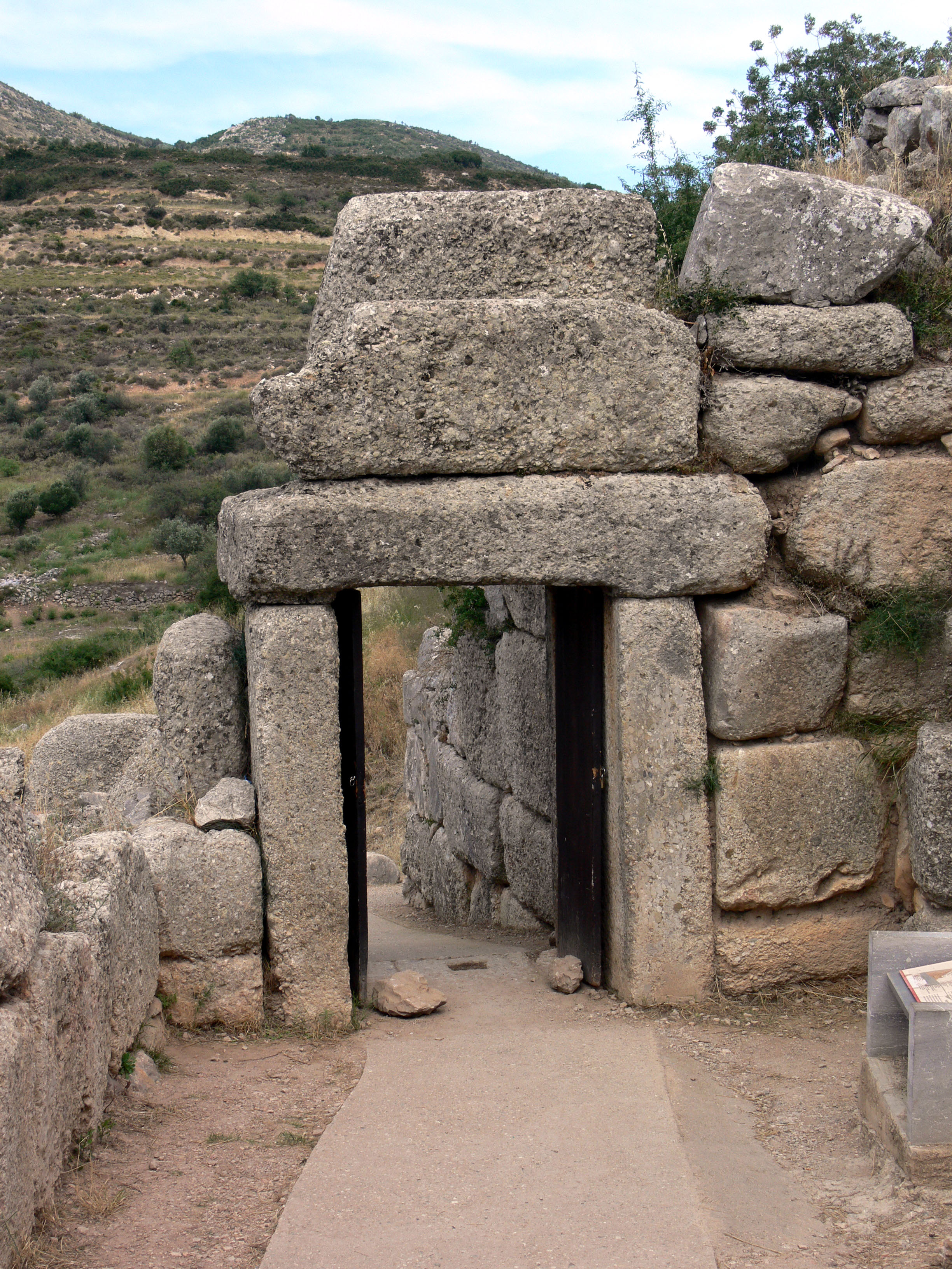 Mykene Palast. Nordtor.